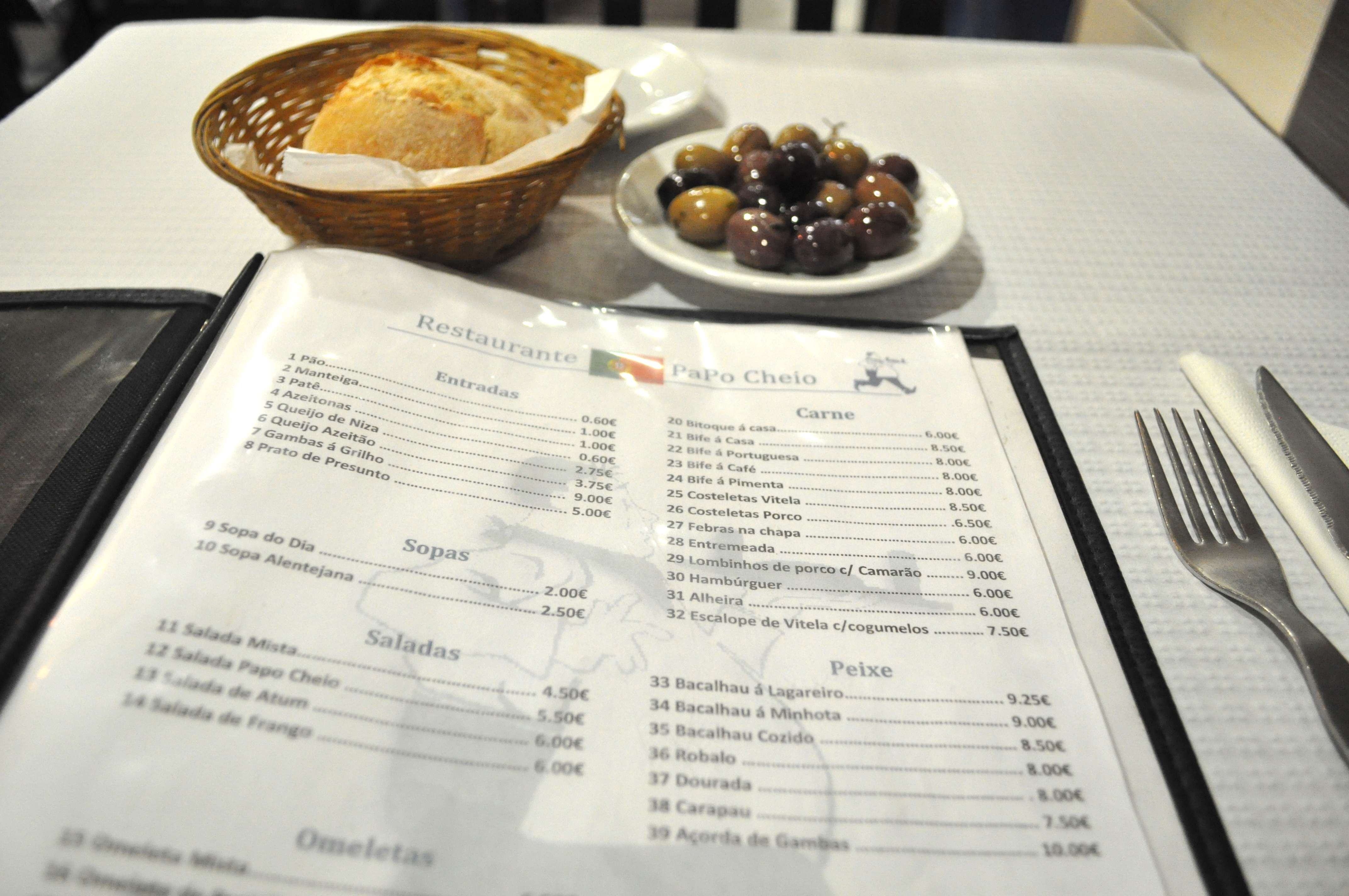 Speisekarte des Restaurants „PaPo Cheio“ in Lissabon, Portugal.